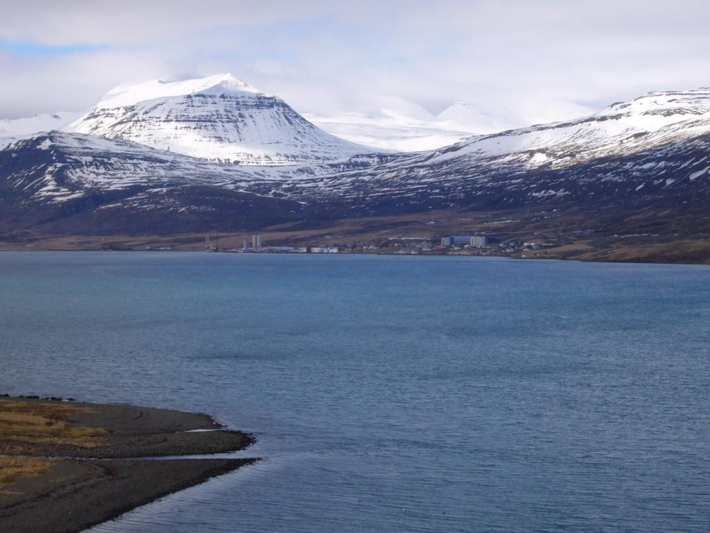 Fjarðaál en Reyðarfjörður, Islandia